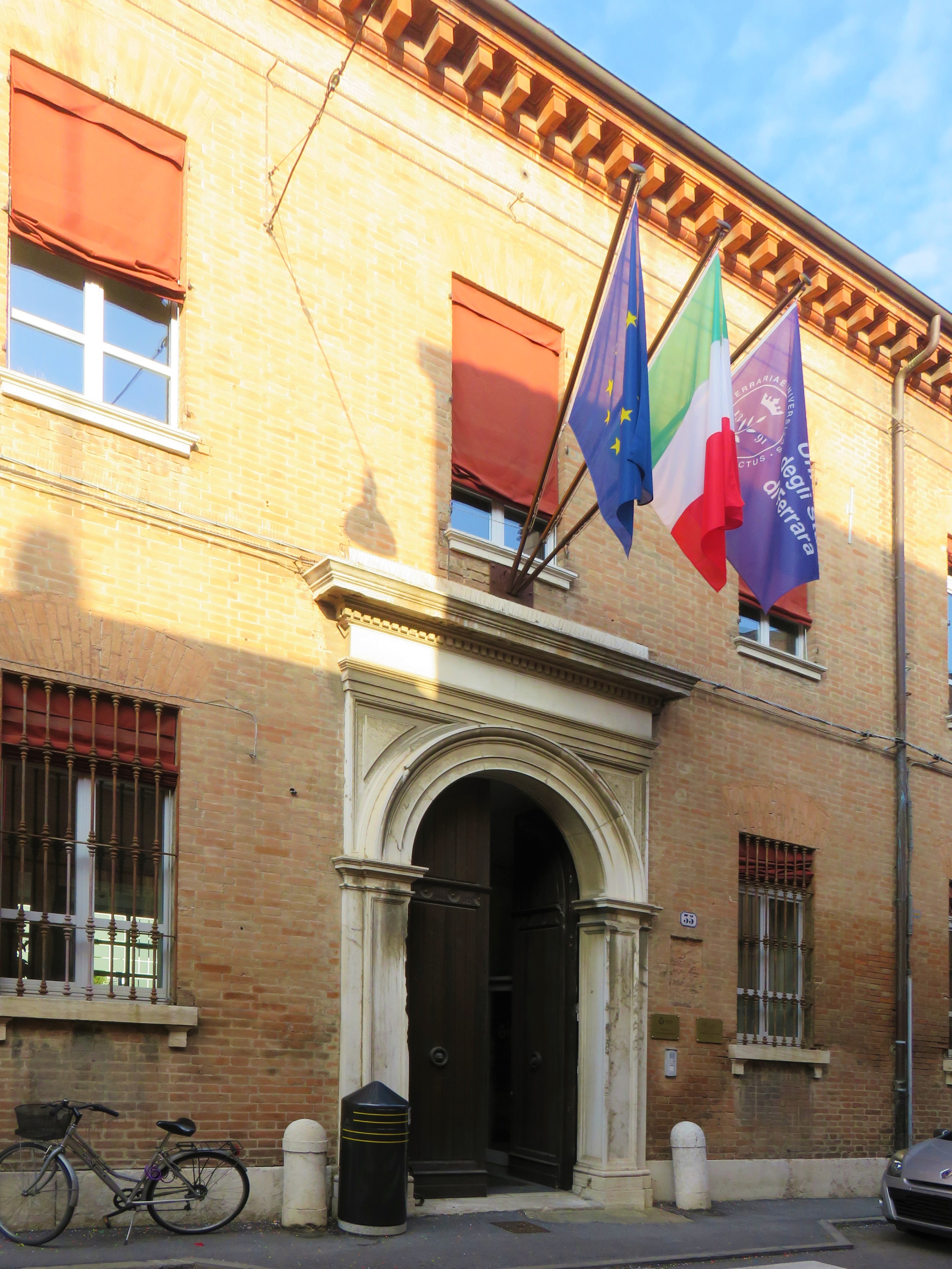 Sede provvisoria rettorato UNIFE dal 1º ottobre 2015 - Ingresso principale in via Ariosto